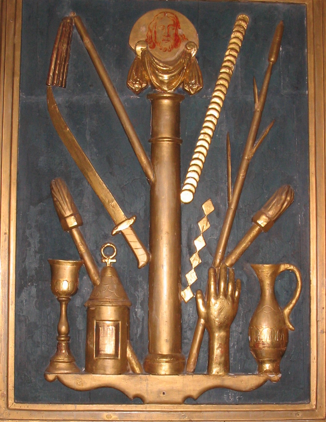 Les instruments de la Passion, église Saint-Pierre de Collonges-la-rouge.